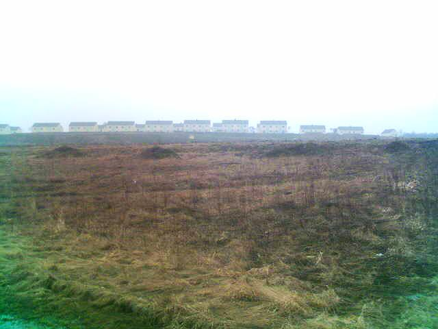 Gdańsk - Kowale